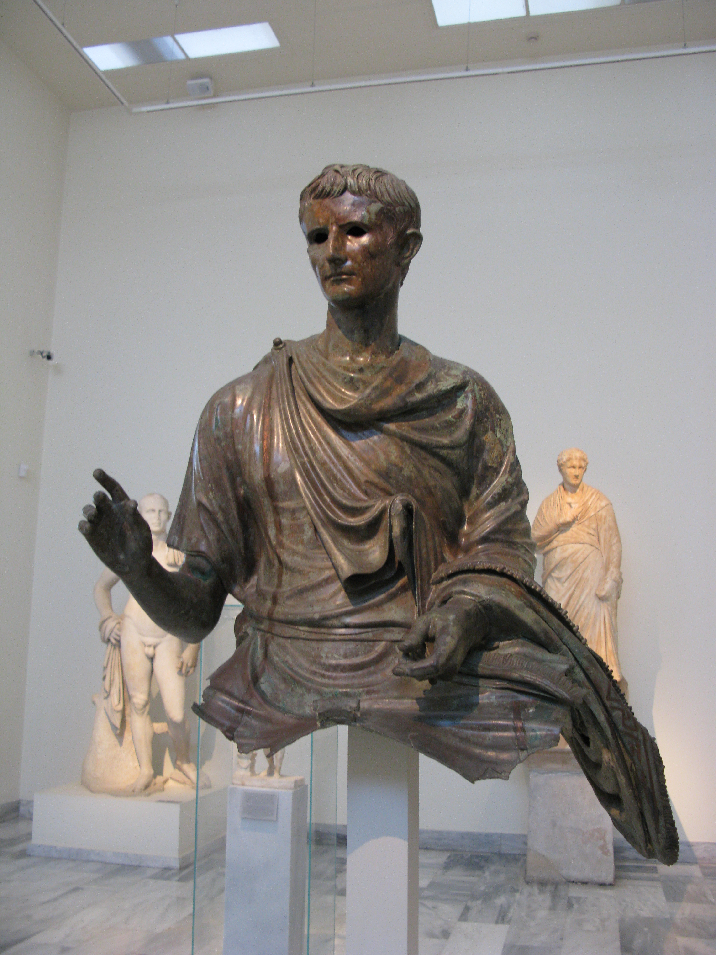 X 23322. Statue of the emperor Augustos (29BC - AD 14). Bronze. Found in the Aegean sea between the islands of Euboea and Agios Efstratios. The emperor is depicted in mature age, mounting a horse. He wears a tunica decorated with a meander pattern. Iconographic features of the Prima Porta gesture of official greeting. The hilt of his sword can be seen below the left hand, in which he held the horse's reigns. On the bezel of his finger-ring a staff of divination (lituus) is engraved, symbolizing the supreme religious office of Pontifex Maximus, assumed by Augustus in 12 BC. 12-10 BC. National Archaeological Museum, Athens, Greece. --- Χ. 23322. Άγαλμα του αυτοκράτορα Οκταβιανού Αυγούστου (29 π.Χ. - 14 μ.Χ.). Χαλκός. Βρέθηκε στο Αιγαίο, μεταξύ των νησιών Εύβοιας και Αγίου Ευστρατίου. Ο αυτοκράτορας απεικονίζεται έφιππος, σε προχωρημένη ηλικία. Φορεί χιτώνα (tunica) με κατακόρυφη πορφυρή ταινία (clavus purpurea) και χλαμύδα (palydamntum). με κροσσωτή απόληξη και διακόσμηση με μαίανδρο. Συνδυάζει εικονογραφικά στοιχεία των τύπων Prima Porta και Ακτίου. Το δεξί χέρι υψώνεται σε χειρονομία επίσημου χαιρετισμού. Κάτω από το αριστερό, με το οποίο κρατούσε τα ηνία του αλόγου, διακρίνεται η λαβή ξίφους. Στη σφενδόνη του δαχτυλιδίου του διακρίνεται αγχάρακτο το ραβδί οιωνισκόπου (lituus), σύμβολο του αξιώματος του Pontifex Maximus, ανώτατης ιερατικής εξουσίας την οποία ο Αύγουστος έλαβε το 12 π.Χ. 12-10 π.Χ. Εθνικό Αρχαιολογική Μουσείο. Αθήνα.